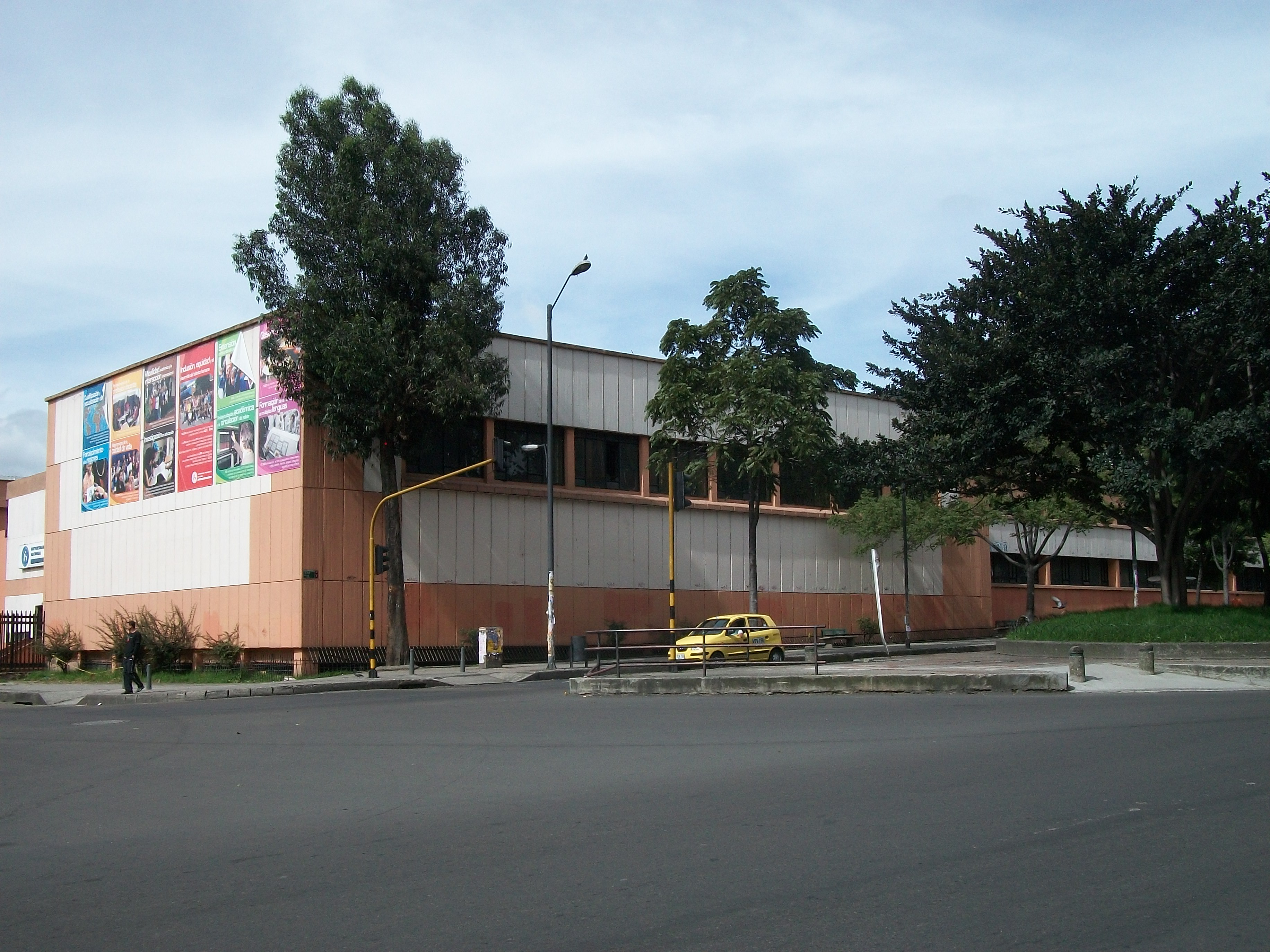 Costado suroccidental de la Universidad Pedagógica, av Chile con clle 12, Bogotá.